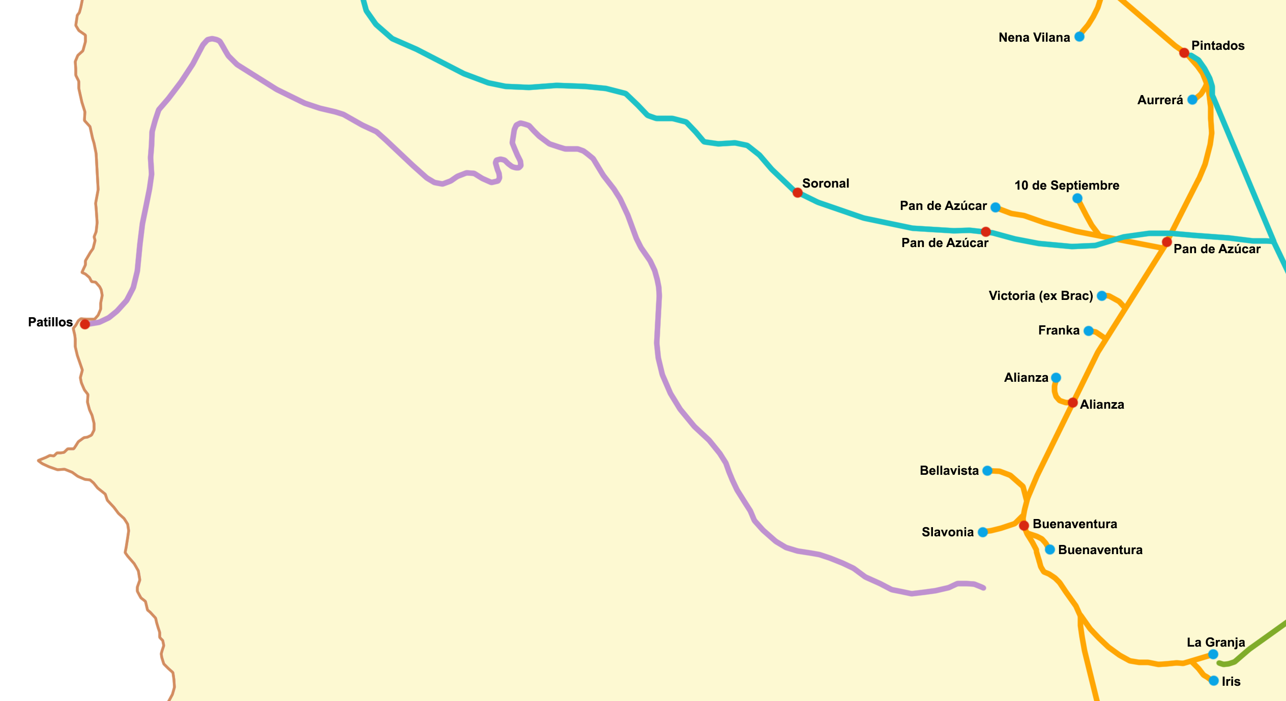 Mapa del trazado del Ferrocarril de Patillos (en color violeta) hacia 1920. Las oficinas salitreras o yacimientos mineros aparecen marcadas en celeste y las estaciones en rojo, mientras que la línea naranja corresponde al Ferrocarril Salitrero de Tarapacá, la línea celeste al Ferrocarril Longitudinal Norte y la línea verde al Ferrocarril de Cerro Gordo.